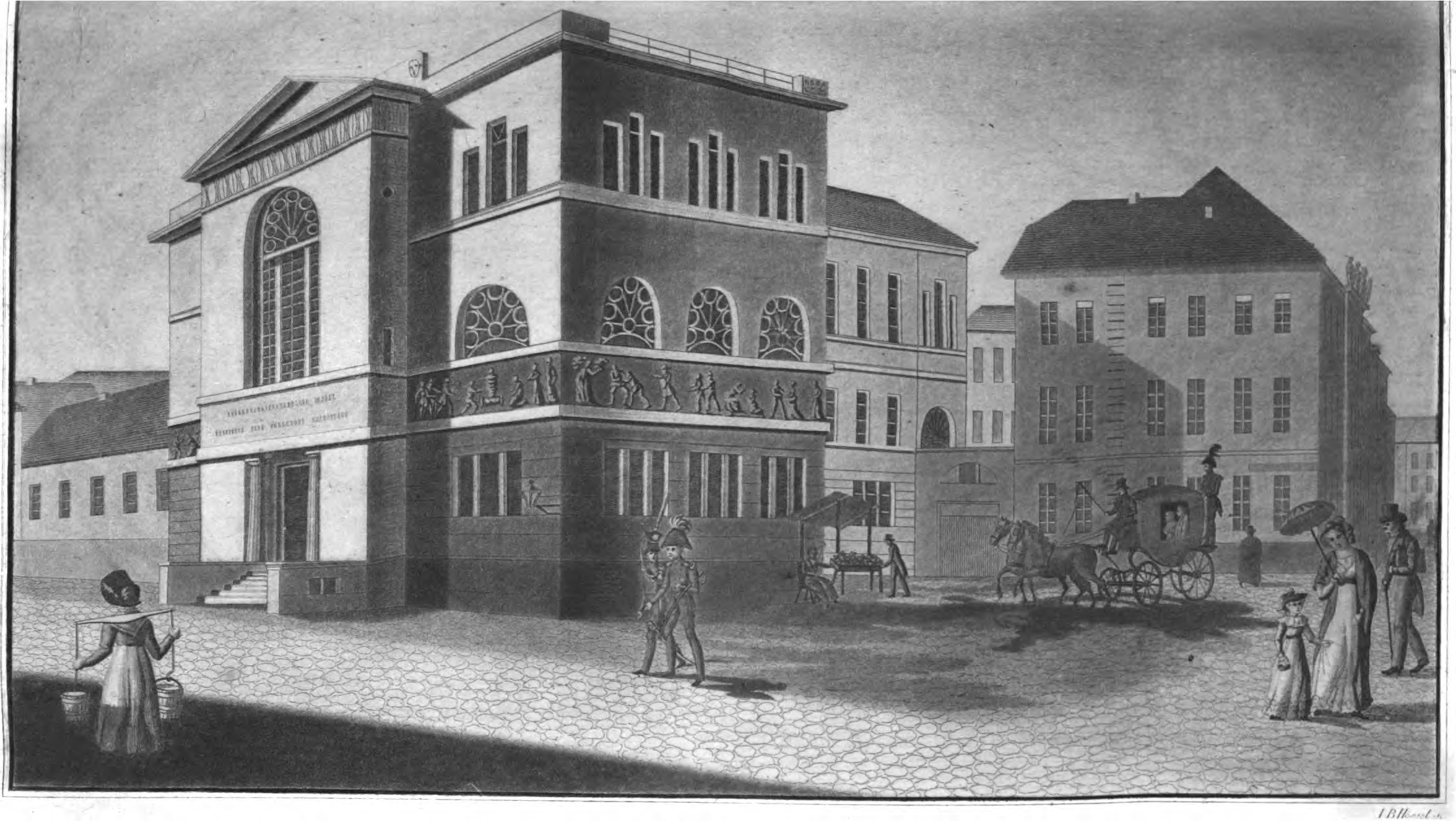 Ansicht der Berliner Alten Münze und des Fürstenhauses